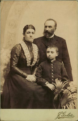 Stefan Buszczyński (1822-1892) z synową Jadwigą z Dmochowskich Konstantową Buszczyńską i wnukiem Stefanem